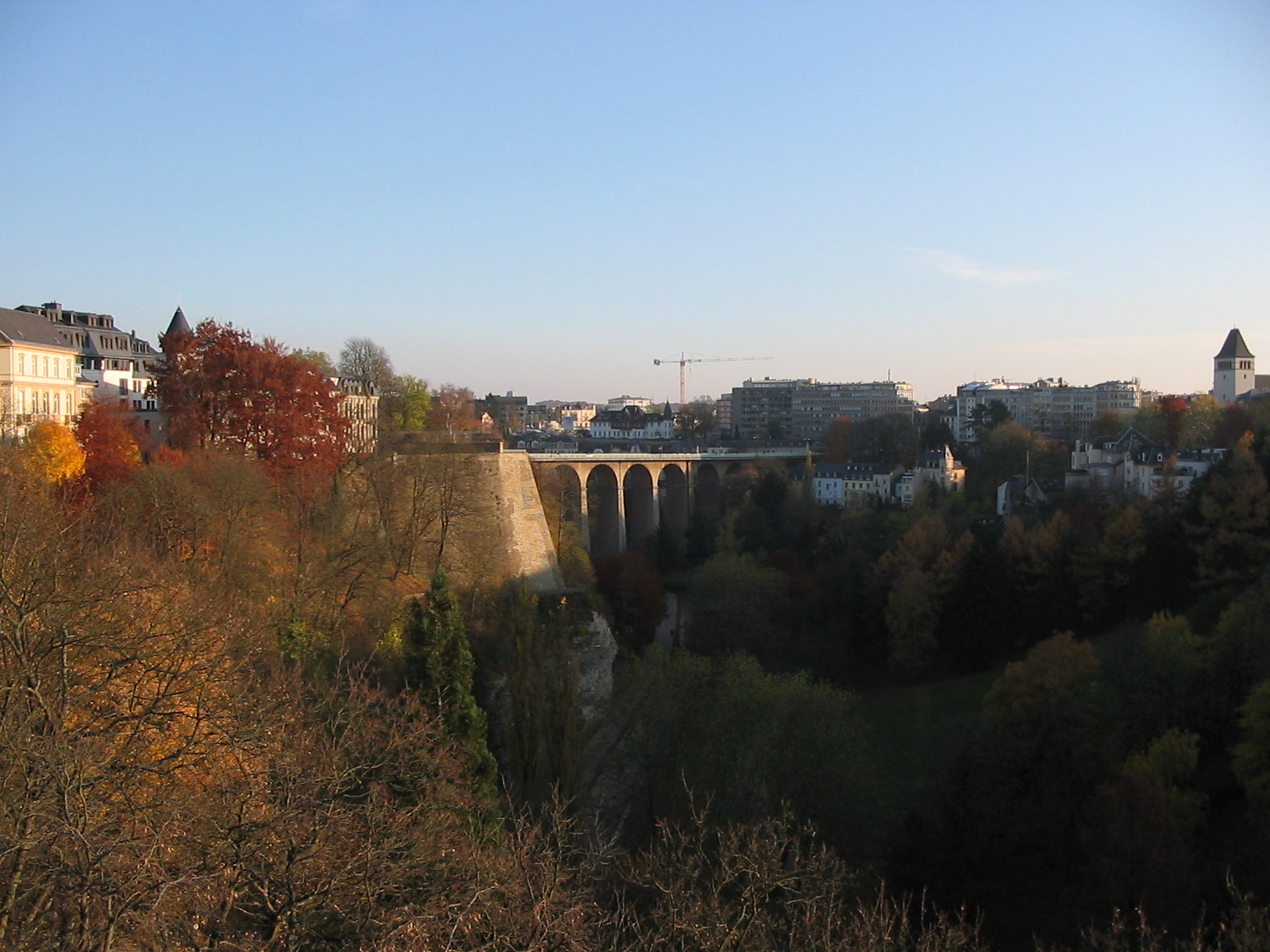 Luxemburg (Stadt). Blick vom Nordende der Adolphe-Brücke über das Petruss-Tal auf die Passerelle